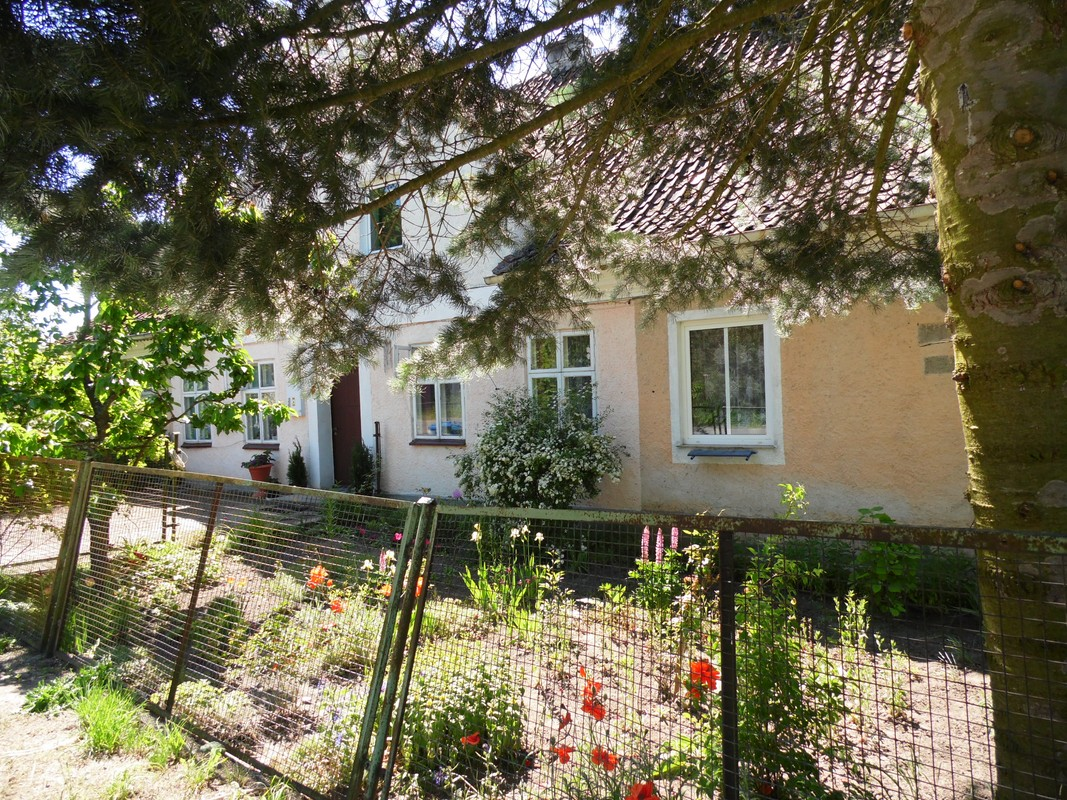 Budynek mieszkalny.